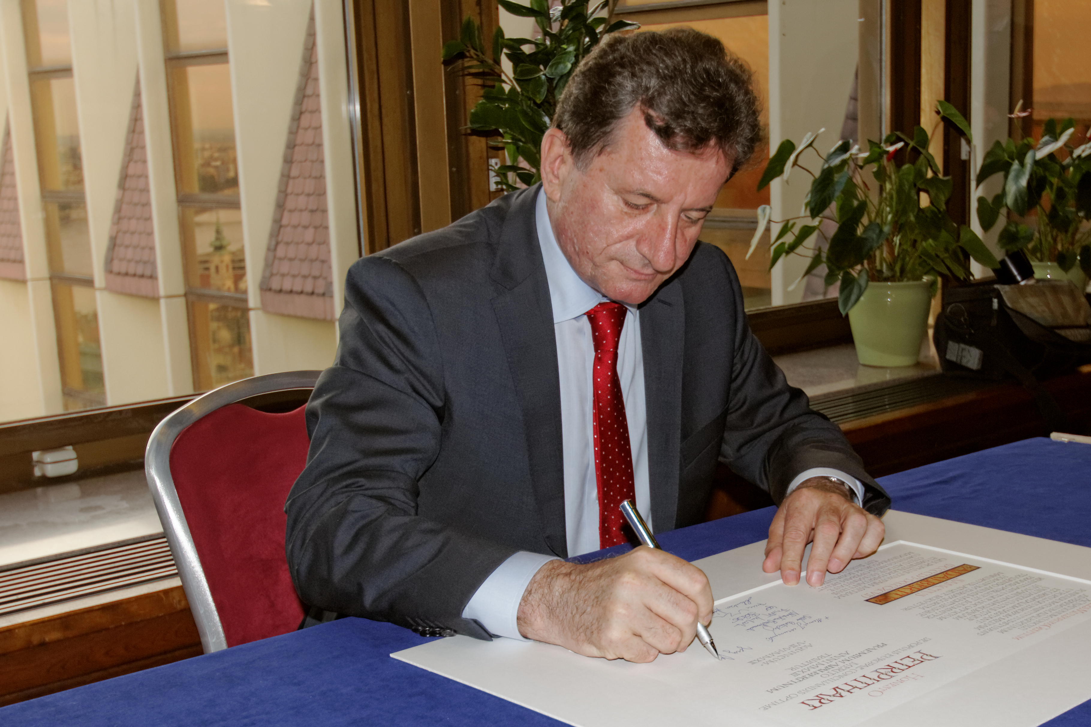 Jerzy Marganski, Botschafter der Republik Polen in Deutschland